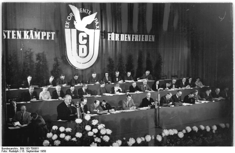 Aufn.: Illus-Rudolph T851 7914-50 5 15.9.50 Kno-Be. 5. Jahrestagung der CDU in Berlin Vom 15. bis 17. September 1950 fand in Berlin die 5. Jahrestagung der Christlich-Demokratischen Union Deutschlands statt. UBz: Blick auf das Präsidium während der Ansprache von Otto Nuschke. Leihweise Illus Berlin WS